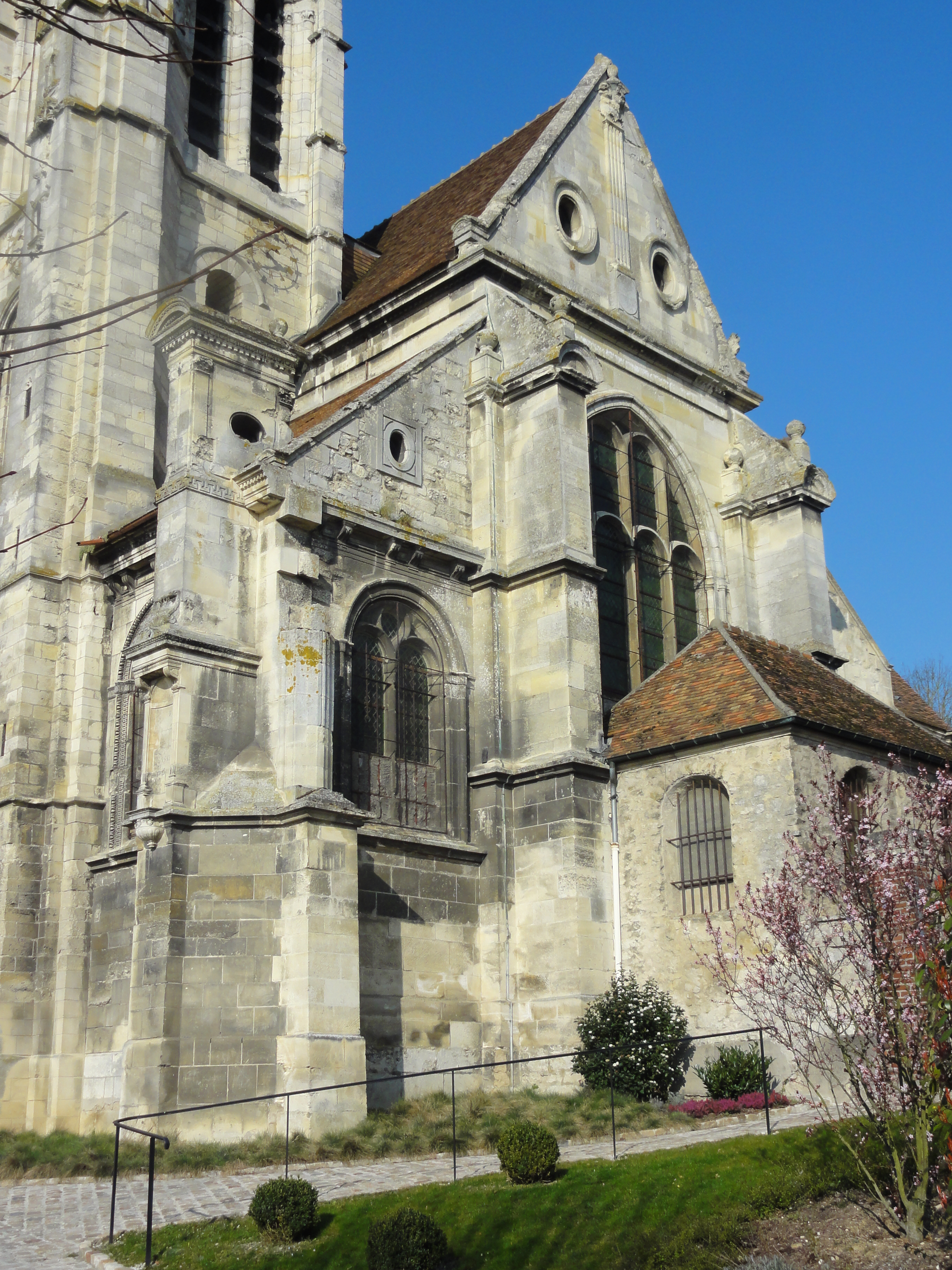 Voir titre.